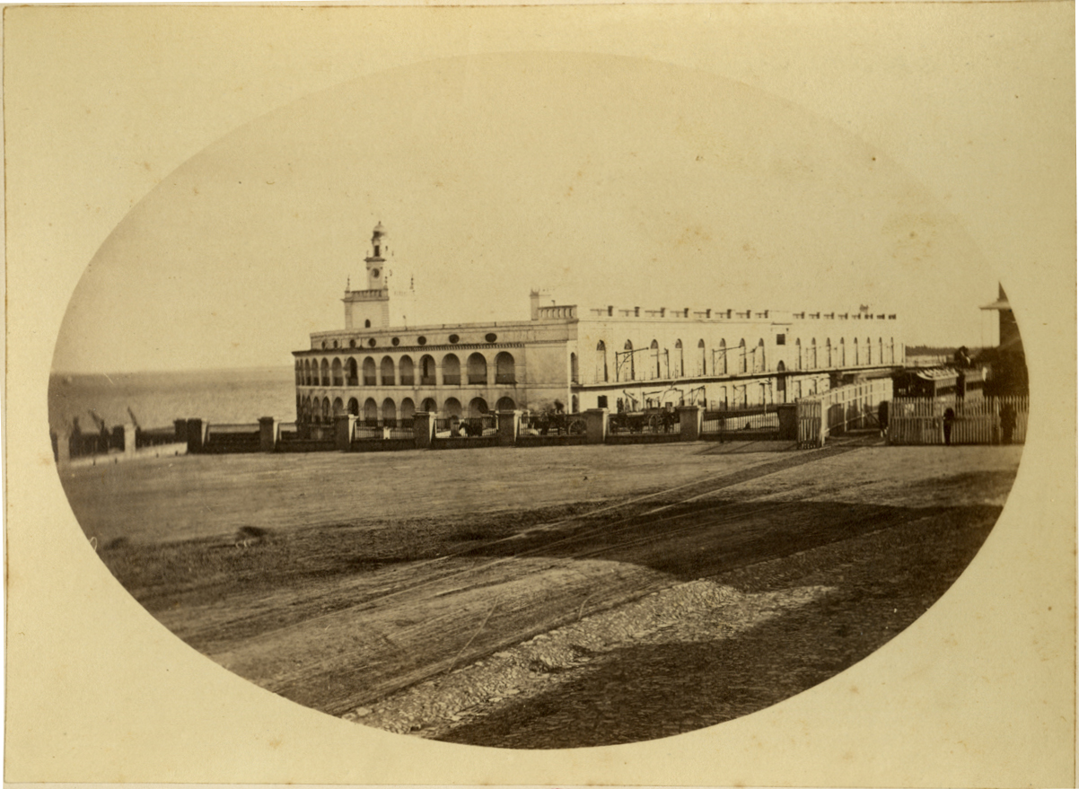 Imagen de la demolida Aduana Nueva, Buenos Aires, Argentina. Aduana de Taylor